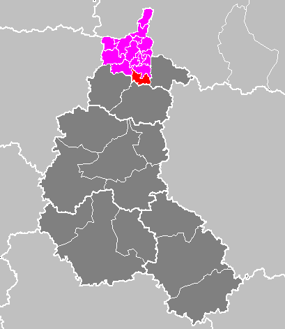 Maps of arrondissements and cantons of France: Arrondissement de Charleville-Mézières - Canton d Omont.PNG